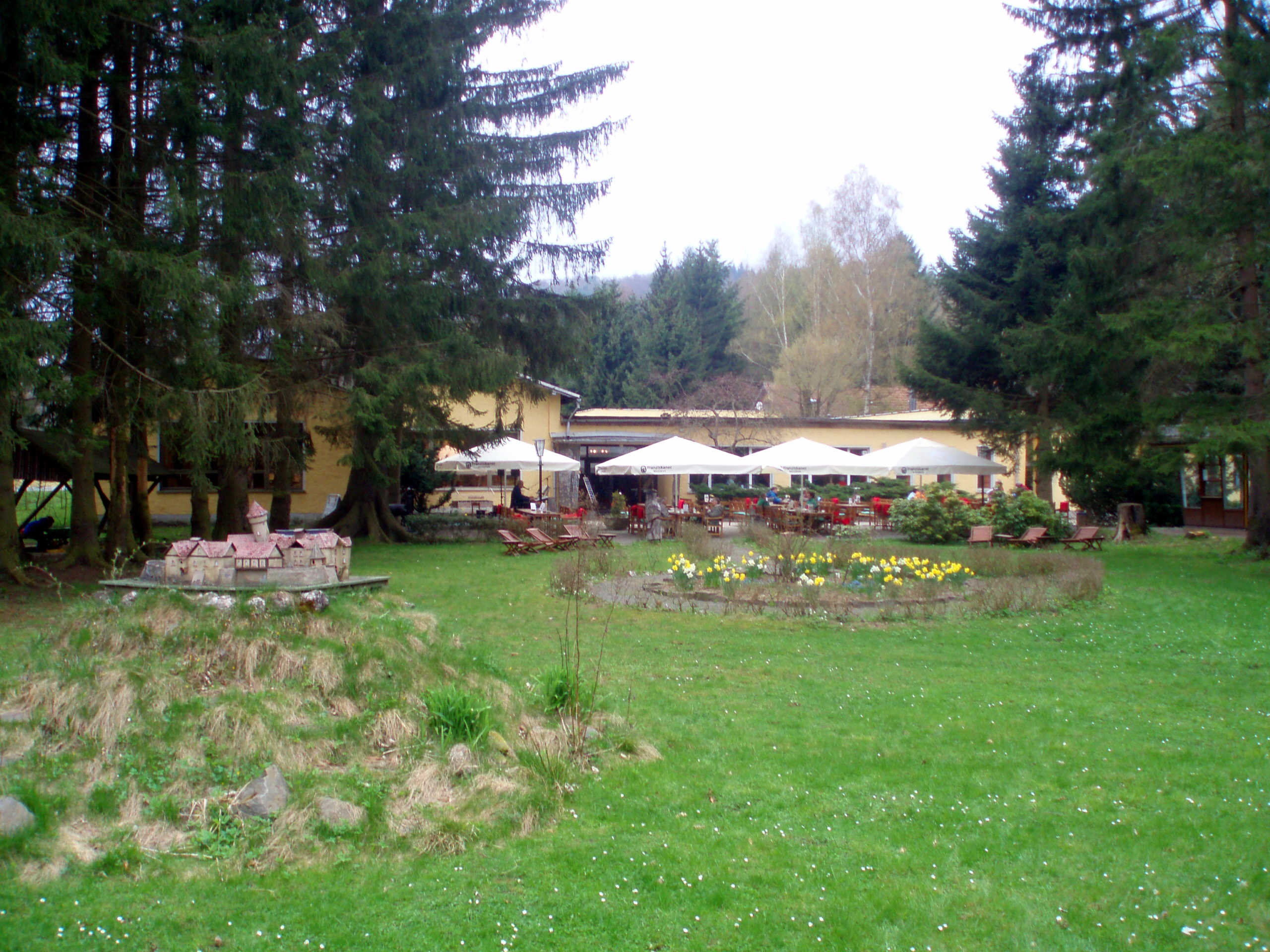 Selkemühle